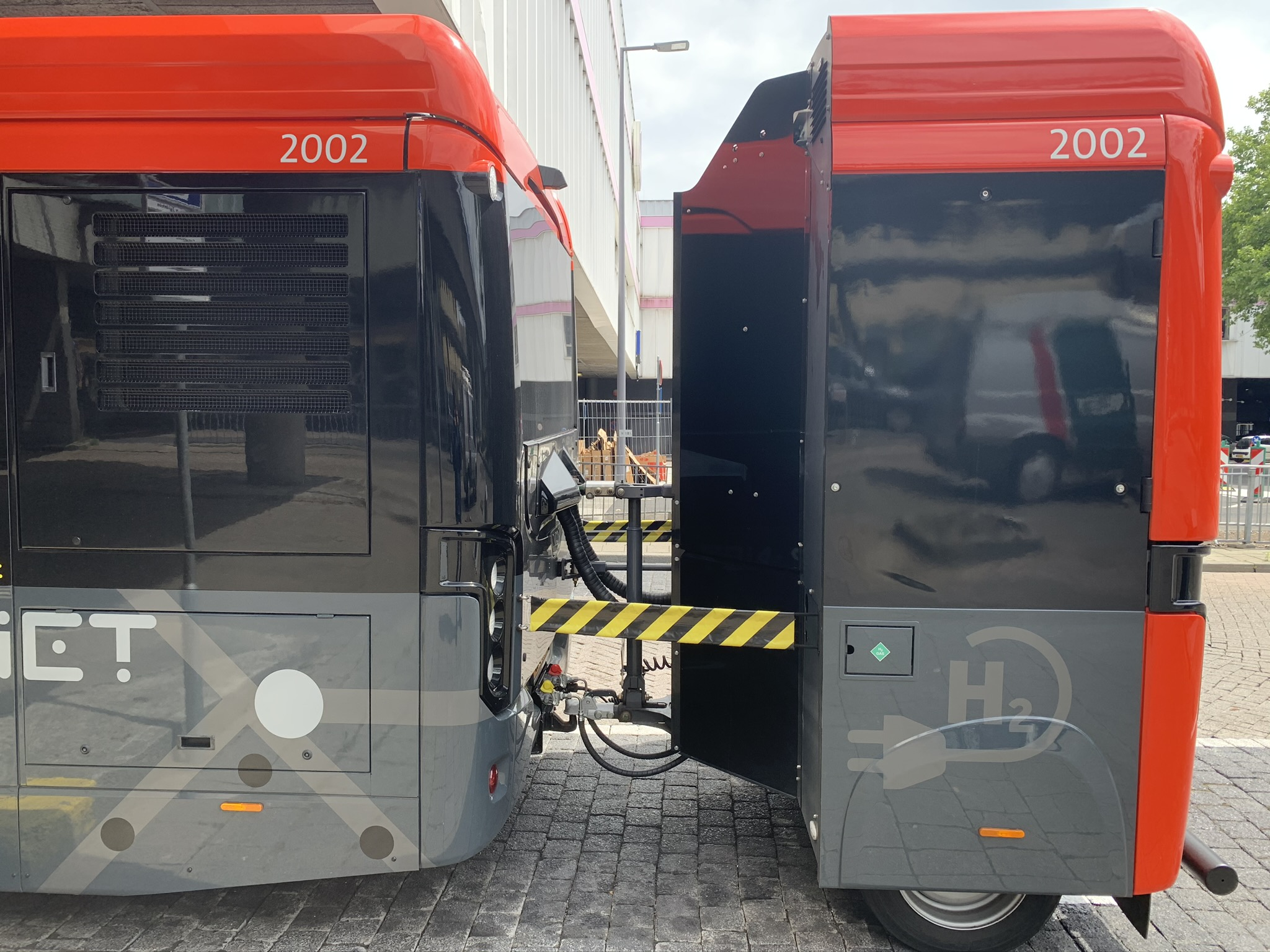 Connexxion 2002 (aanhangwagen) te Rotterdam Zuidplein, 8 juli 2020